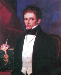 Retrato de José Gregorio Paredes